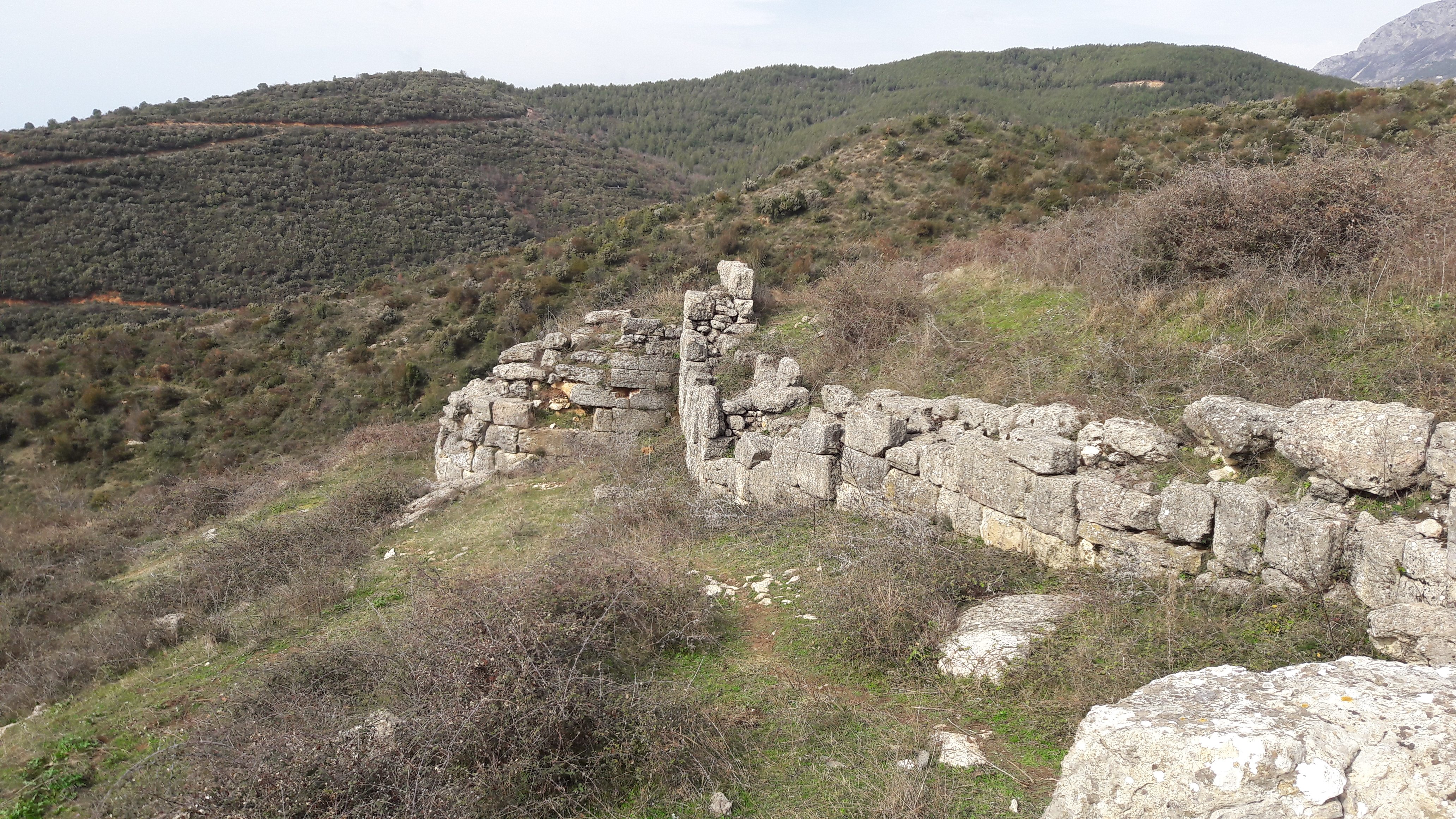 Kulla mbrojtëse